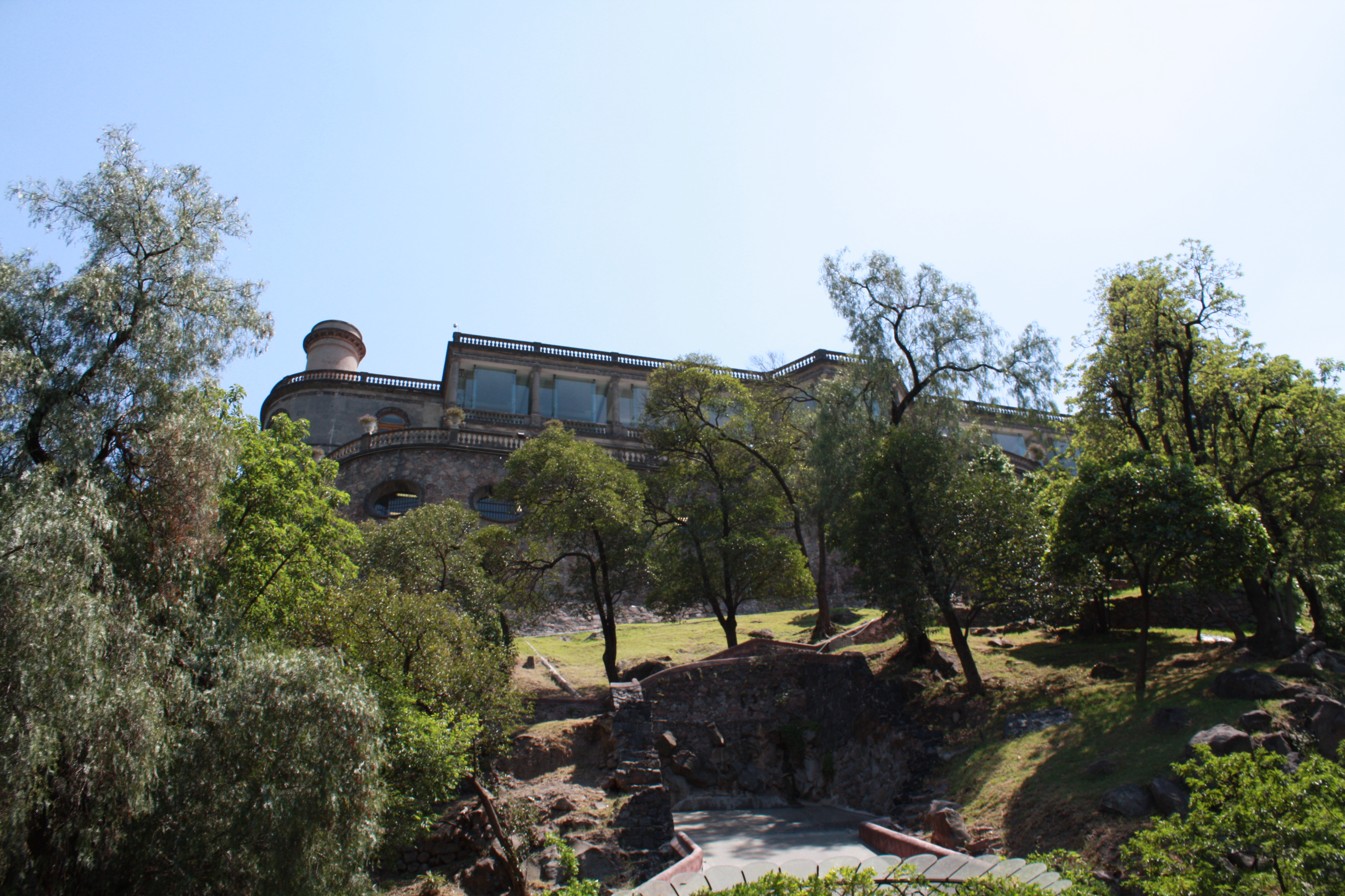 Vista desde el camino hacia el castillo.